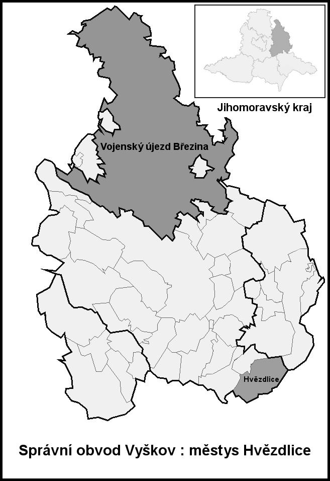 Hranice Hvězdlice (Vyškov- czech republic)